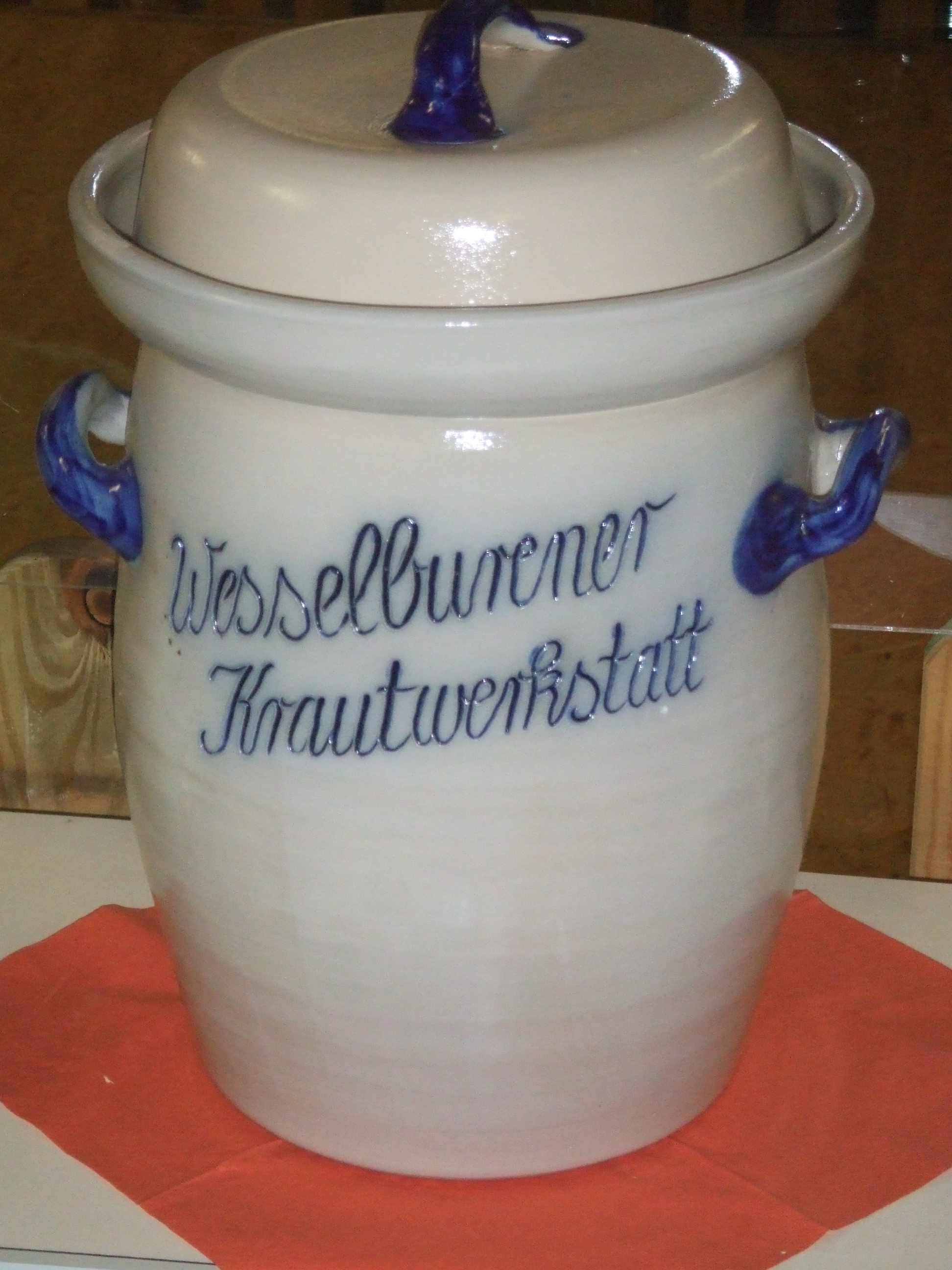 sauerkrauttopf aus wesselburen, germany